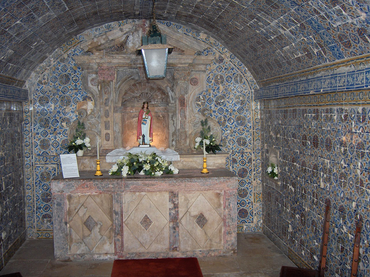 Historic chapel; Forte da Ponta da Bandeira; Lagos, Portugal